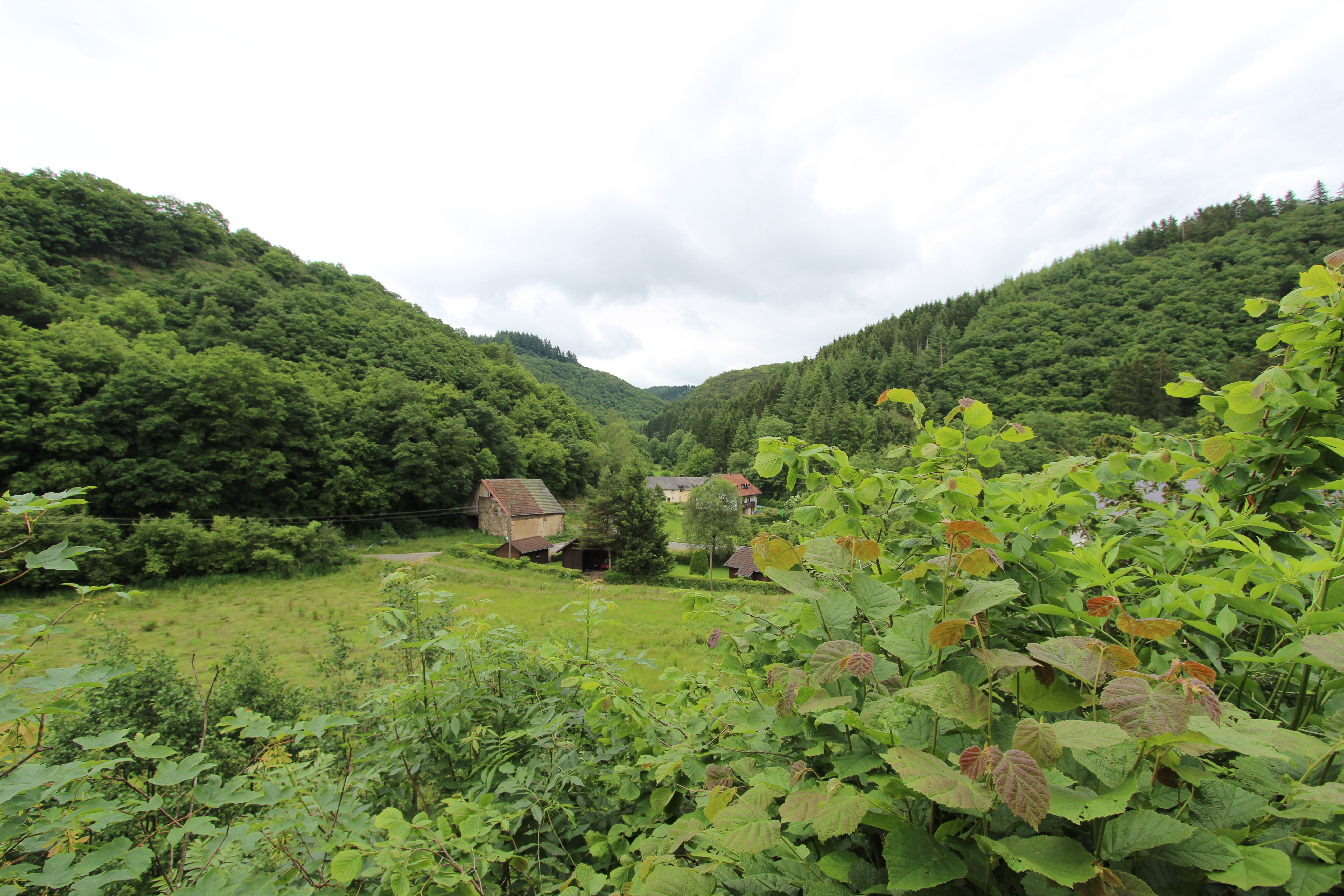 Panoramablick über 54675 Fischbach-Oberraden. Standort: von der St. Borromäus Kirche. Aufnahme 2016.